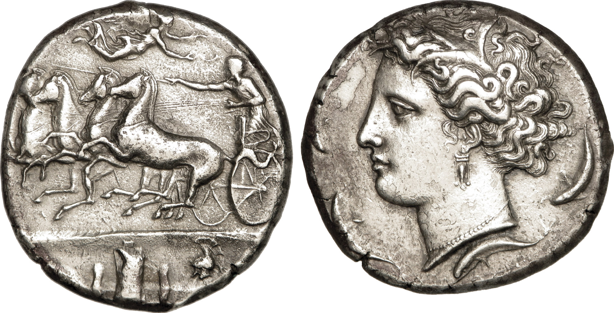 Nom de l'atelier : Sicile, Syracuse Métal : argent Diamètre : 34,00mm Axe des coins : 9h. Poids : 43,09g. Description avers : Quadrige bondissant à gauche conduit par un aurige, tenant les rênes et le kentron, couronné par une Niké volant à droite ; ligne d’exergue épaisse ; à l’exergue, trophée d’armes constitué d’une javeline, d’une cuirasse et d’un casque attique. Légende avers : [AQLA]. Traduction avers : (Athla) . Description revers : Tête de Perséphone (ou Aréthuse) à gauche, couronnée d'épis avec des boucles d'oreilles et un collier de perles, entourée de quatre dauphins. Légende revers : [SURAKO]S-IWN/ EU-AINE. Traduction revers : (de Syracuse/ Evainète)